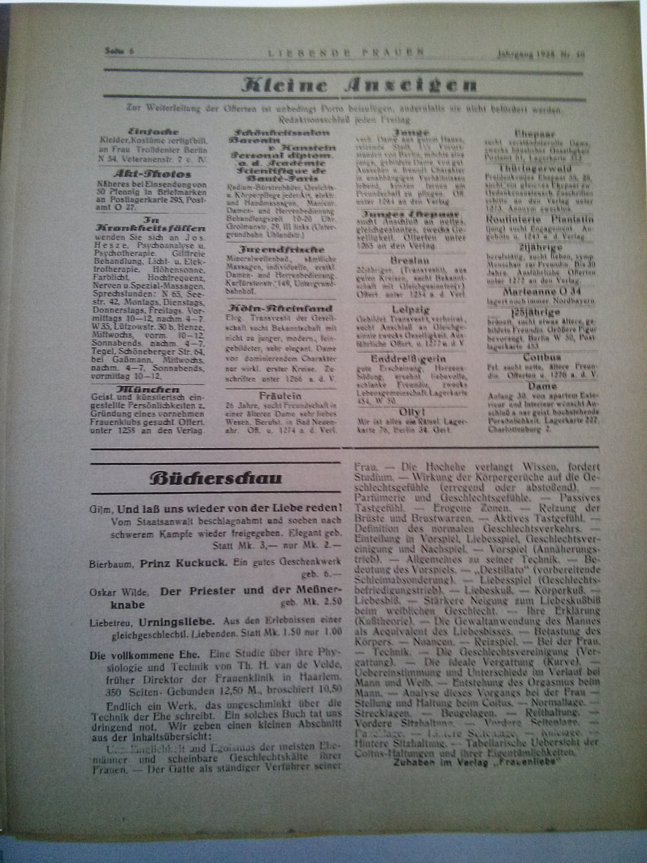 Aus der lesbischen Zeitschrift "Liebende Frauen", Berlin, 1928, Seite 6 Ausgabe 40